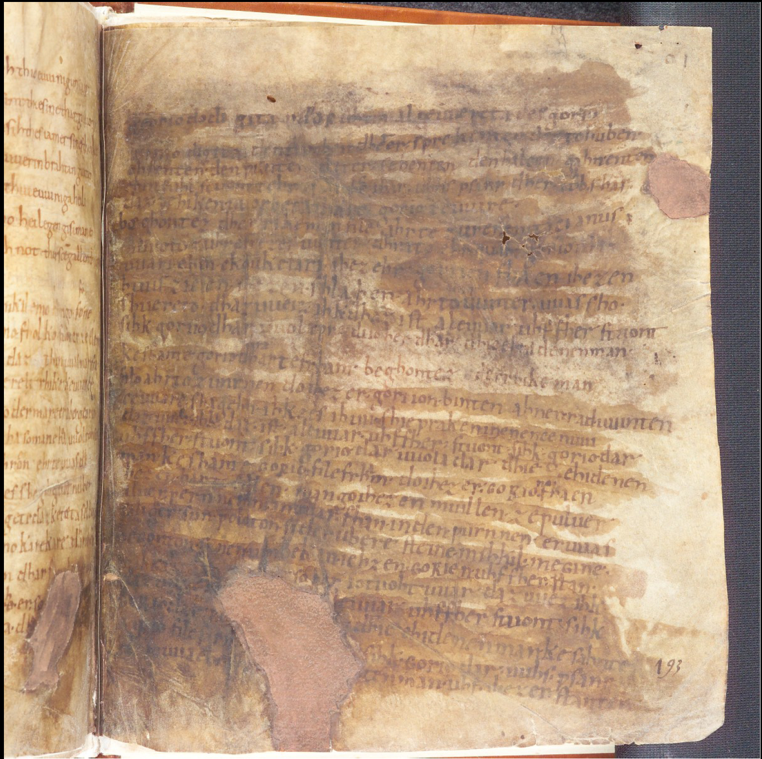 Fragmentarische Abschrift des Georgsliedes. Entstanden ist der Text Ende des 9. Jahrhunderts vermutlich im Kloster Prüm oder auf der Insel Reichenau (Bodensee).